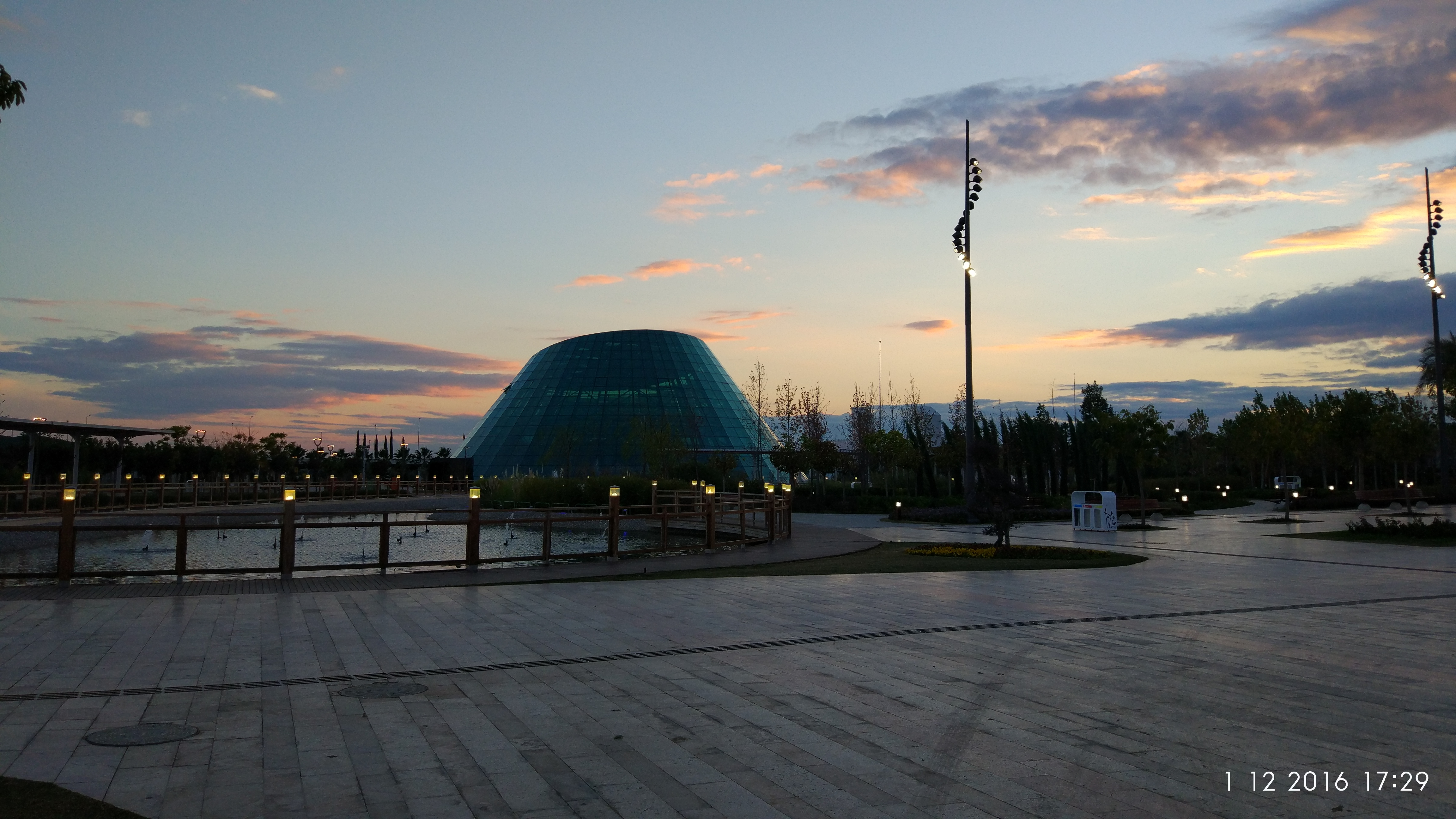 Expo Sera'sının akşam vakti görünümü.